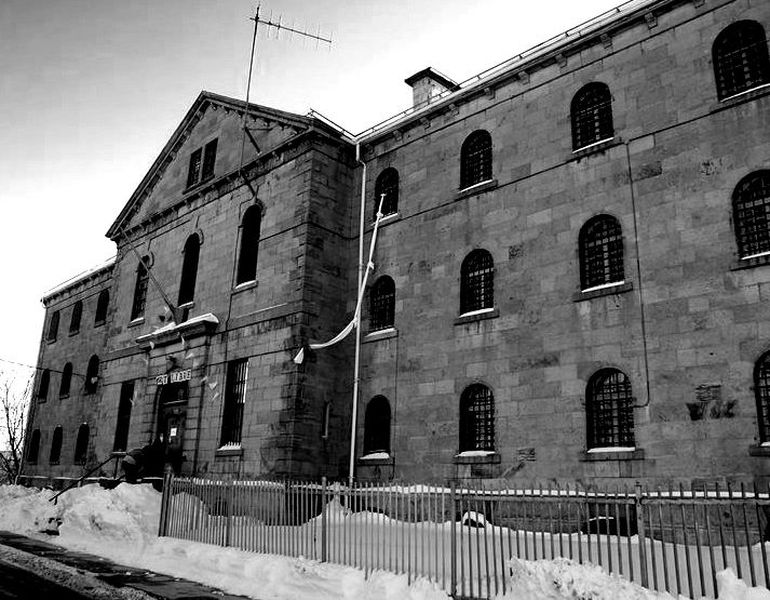 Ancienne prison Winter à Sherbrooke, Québec